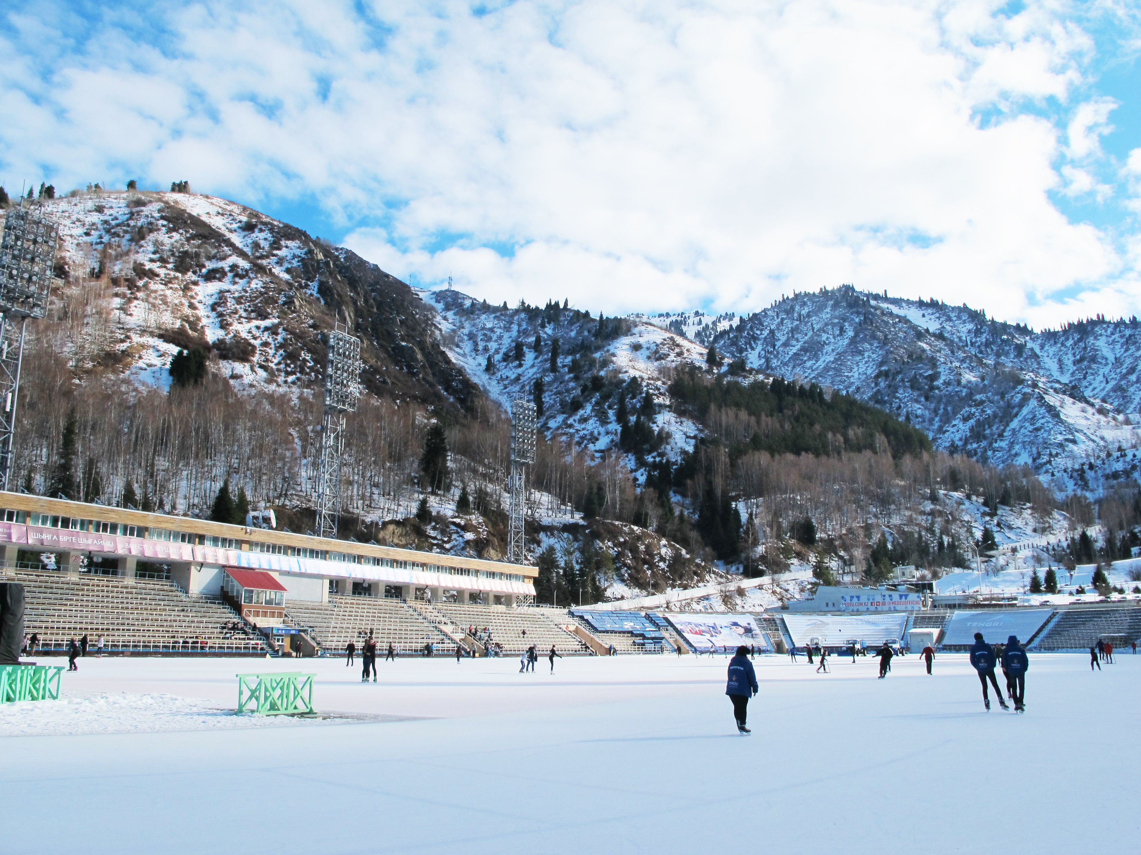 Foto de una tarde en el Medeu.